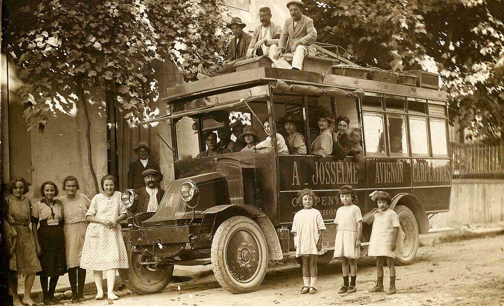 Autocar Carpentras Avignon A; Josselme